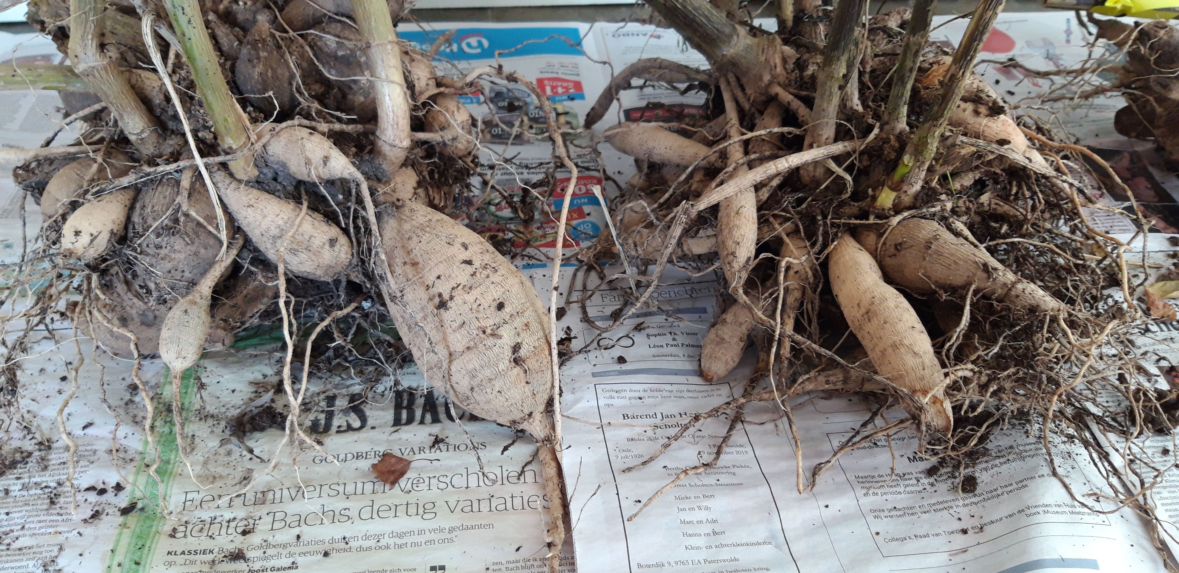 Opgegraven dahliaknollen